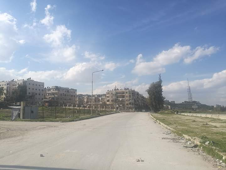 حي الزبدية